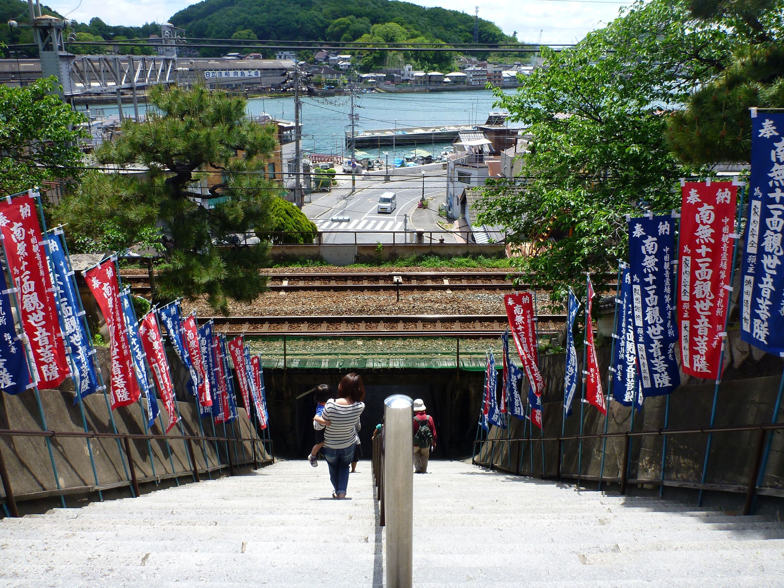 浄土寺参道